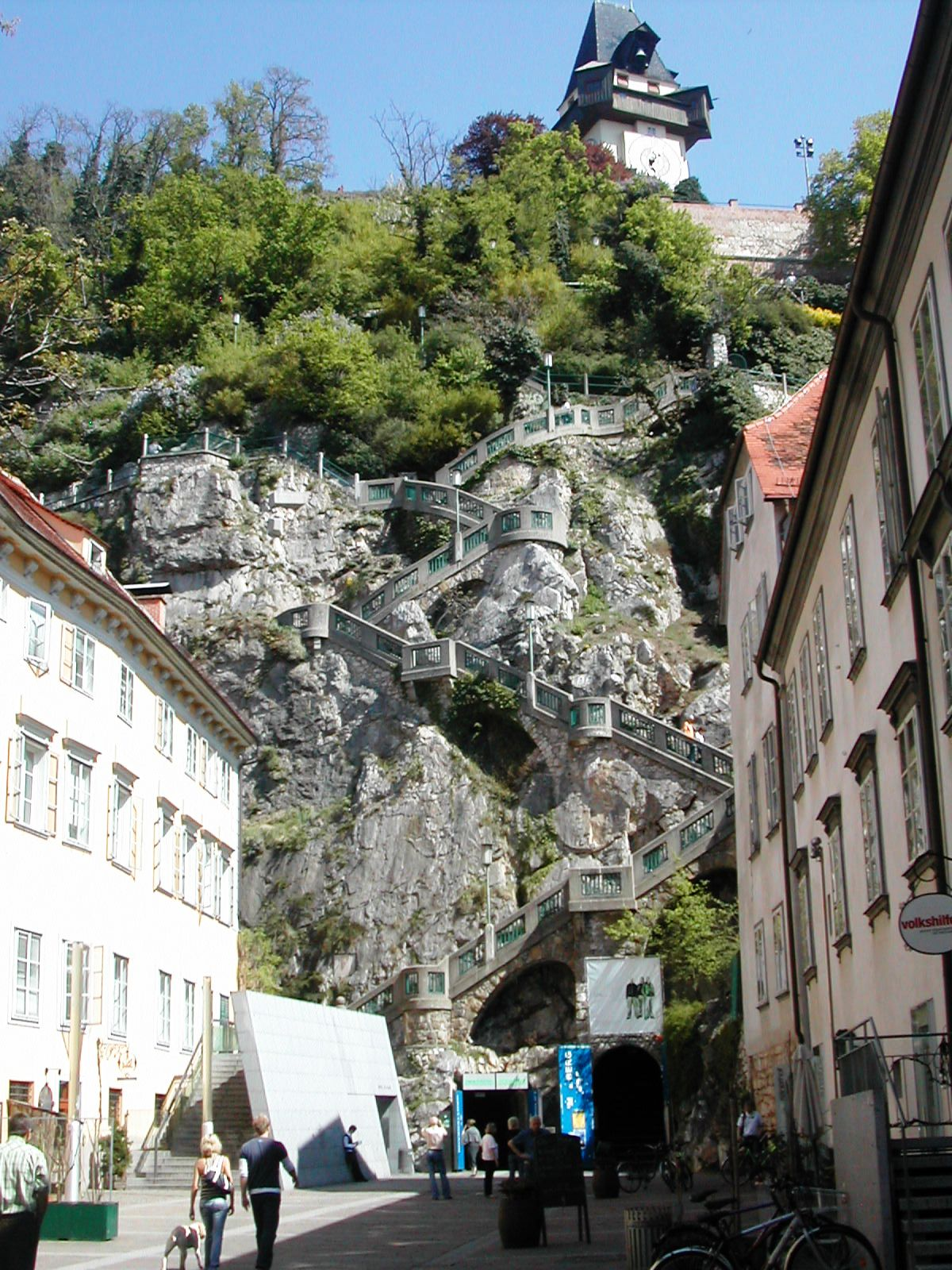 Kriegssteig von Schloßbergplatz gesehen